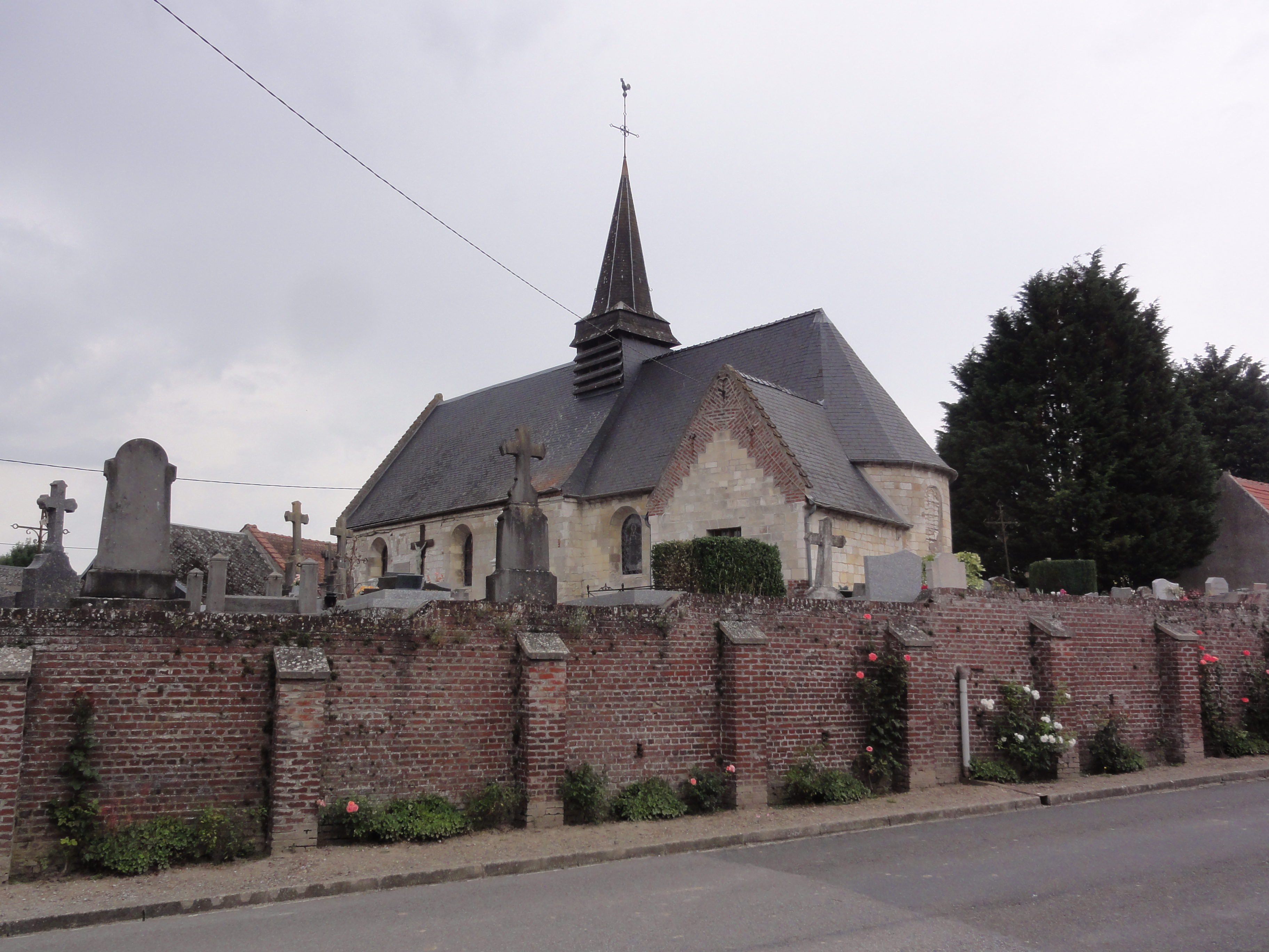 Croix-Fonsomme (Aisne) église